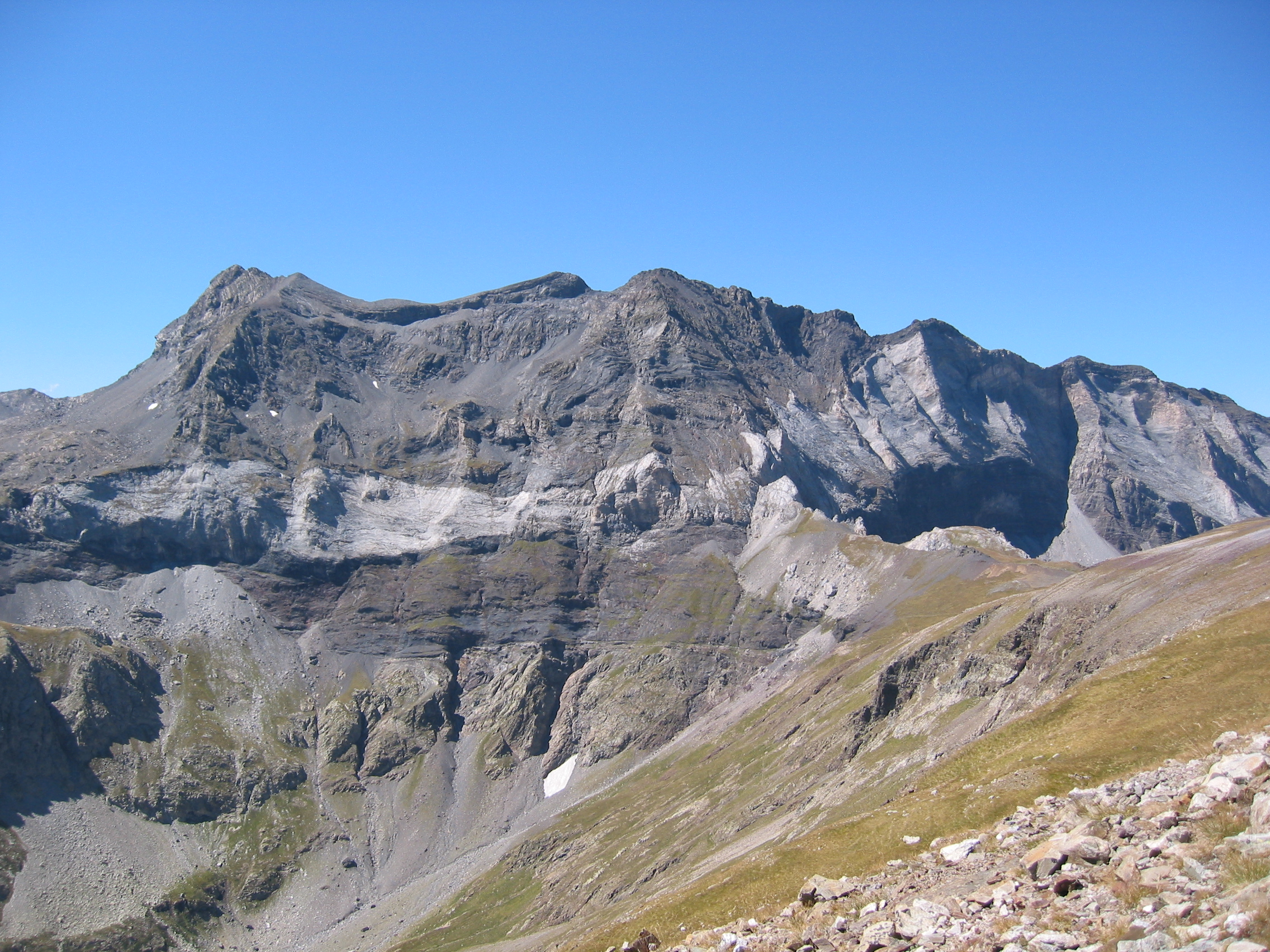 Falaise nord du cirque de Barrosa sous les pics de La Munia et de Troumouse, avec ses différentes couches géologiques, de haut en bas : schistes et calcaire dévoniens, ampélite à la base de laquelle court le chemin des mines au niveau du plan de chevauchement de la nappe de charriage de Gavarnie, et cornéenne ; à droite, le port de Barroude au-delà duquel se déploie la muraille de Barroude.